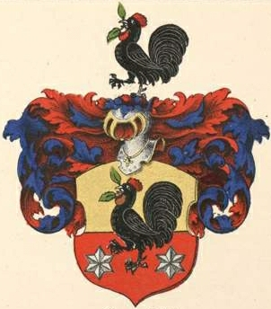 Hanenfeldti suguvõsa aadlivapp